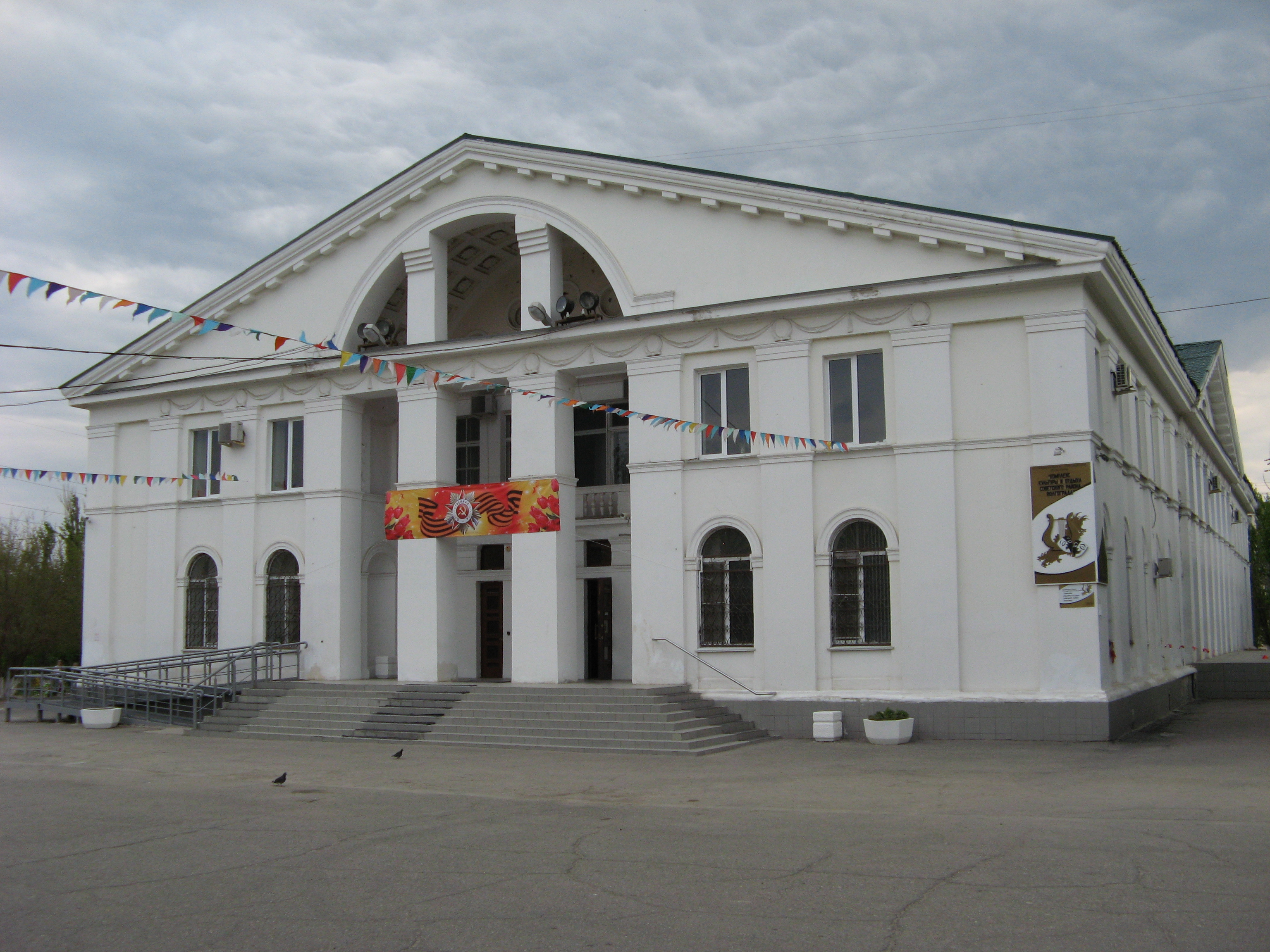 Дом культуры им. Петрова Г.К.: улица Даугавская, 1, Советский район, Волгоград, Волгоградская область